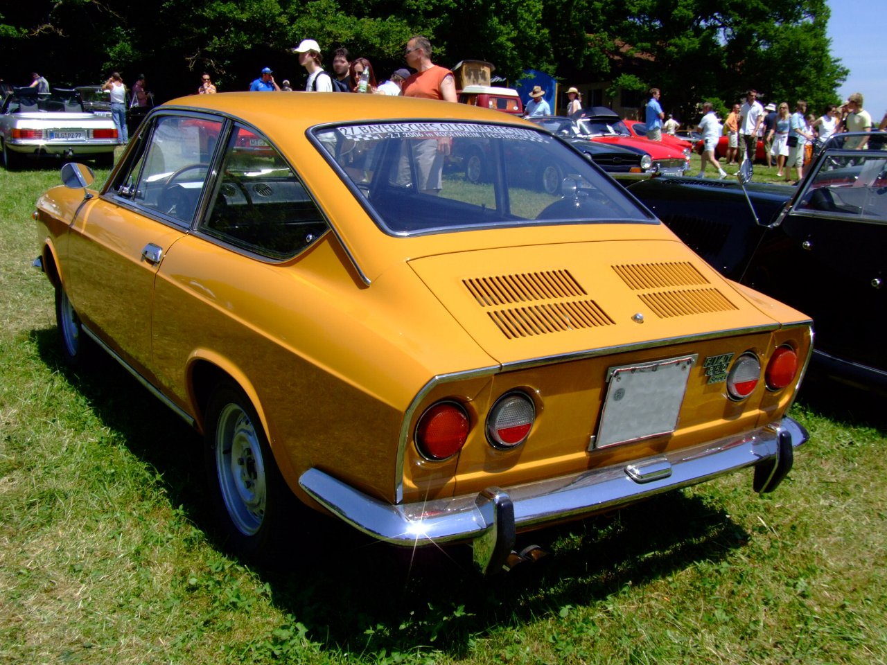 Fiat 850 Sport Coupé (1968-1971) Fiat 850 Sport Baujahr: 1969 52 PS